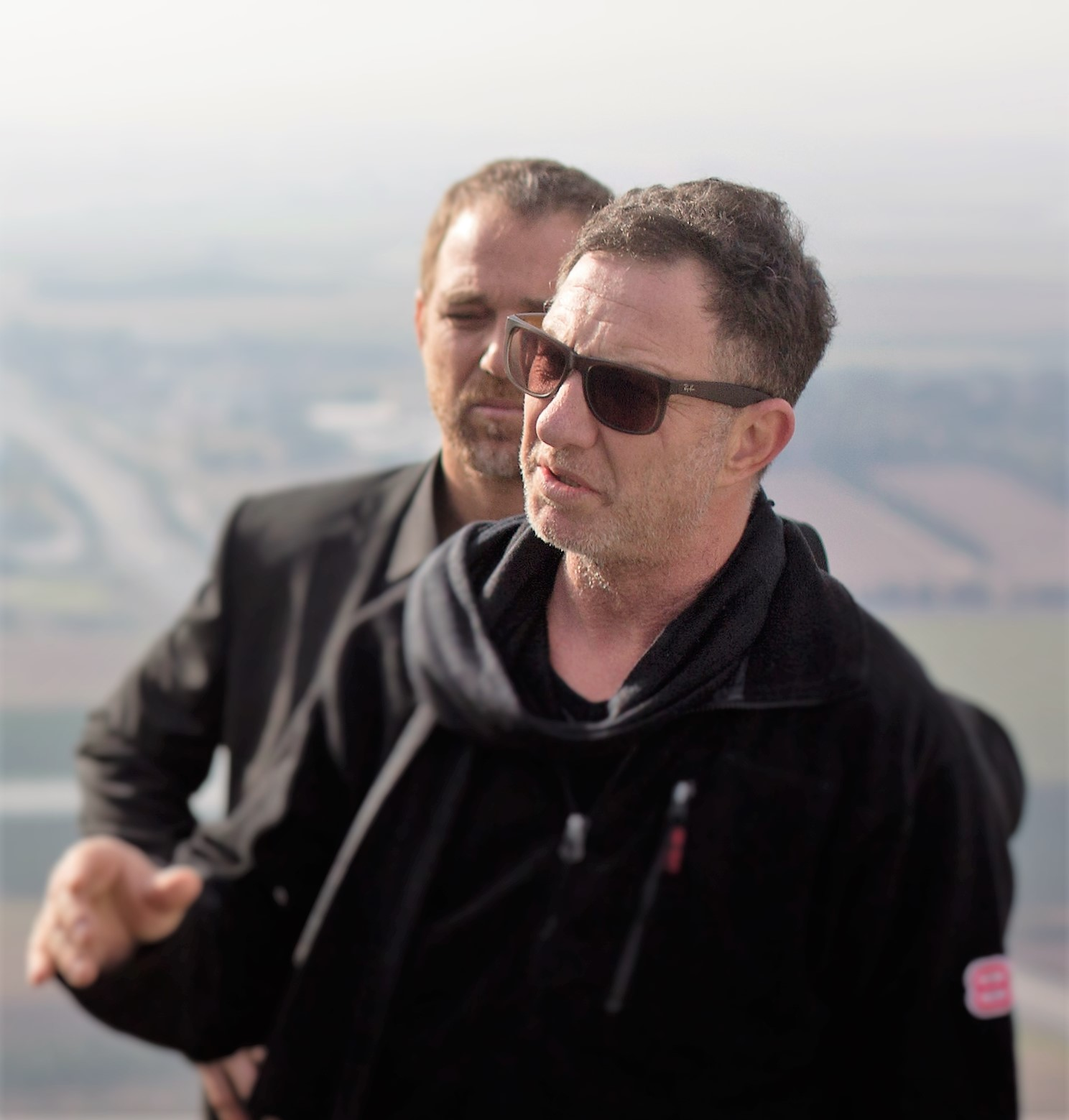 אילן מוסקוביץ